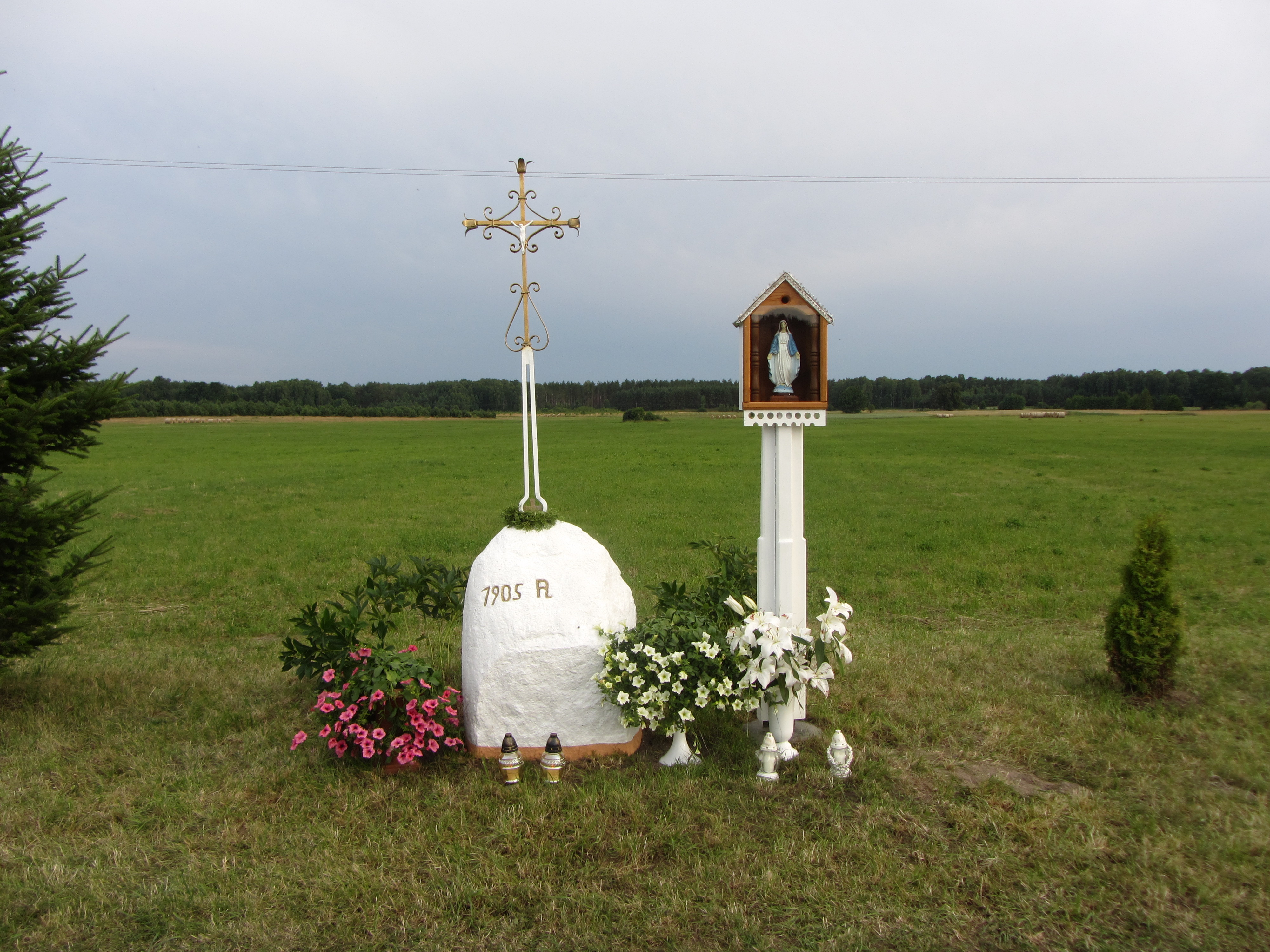 Kapčiamiesčio sen., Lithuania